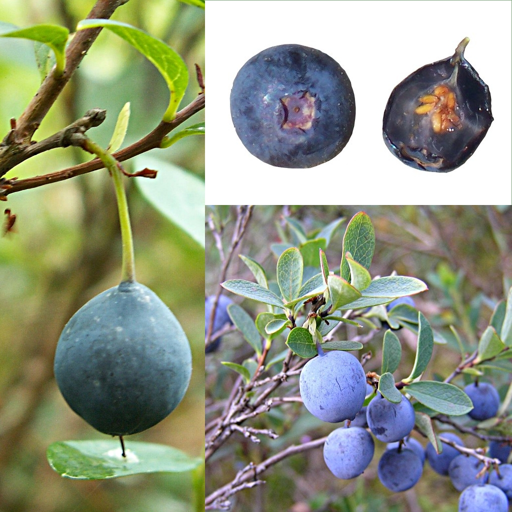 Grafika podręcznika Wikijunior:Owoce. Borówka bagienna (Vaccinium uliginosum).